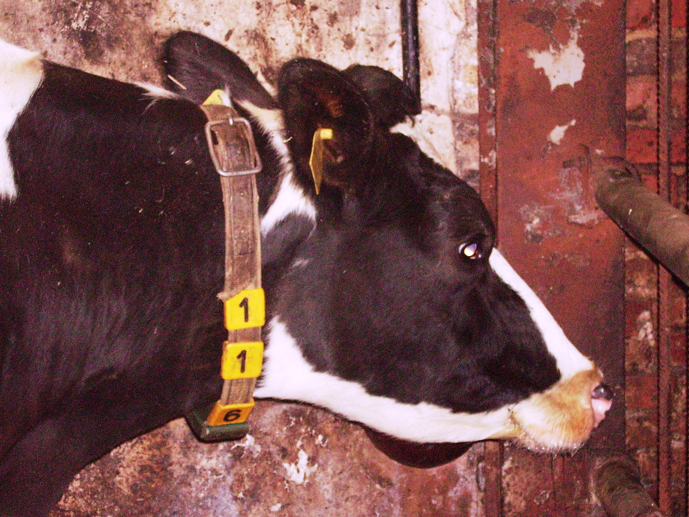 Es handelt sich um ein an Tetanus erkranktes Holstein-Rind. Typisch sind die Kieferklemme sowie die nach kaudal gerichteten Ohren. Walon: Tetanosse a ene vatche Hostine. Loukîz li gueuye serêye et les orayes saetcheyes e-n erî.